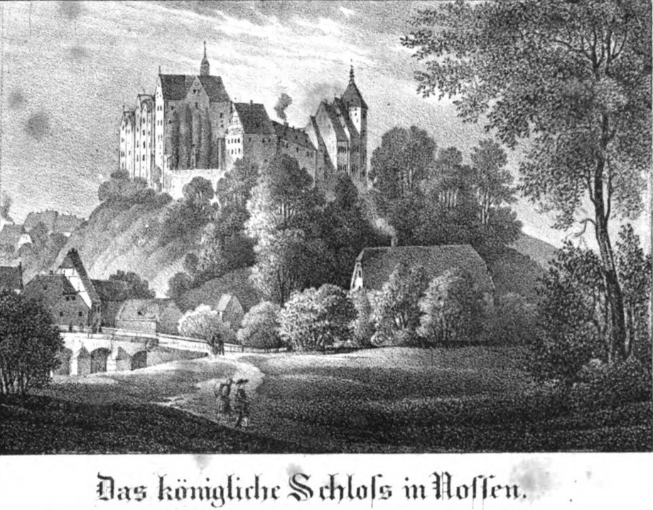 Saxonia Museum für saechsische Vaterlandskunde. Band 1. Dresden: Pietzsch und Comp. Siehe File:Saxonia Museum für saechsische Vaterlandskunde I.djvu